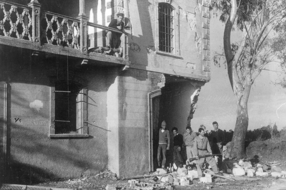 חטיבת הראל - הגדוד החמישי - 1 - ההגנה על בית הקרן הקיימת לישראל בבית-דגון - חברי הפלמ"ח ששמרו על הבניין ליד ההריסות,לאחר הפיצוץ.. עומד משמאל: אליהו רובין